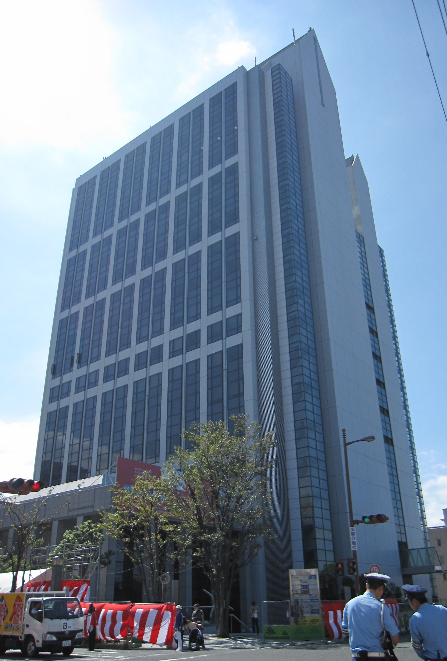 泉佐野センタービル